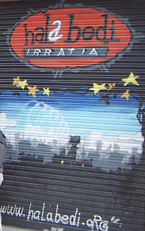 Hala Bedi irratiaren egoitzaren pertsiana metalikoan dagoen margoa